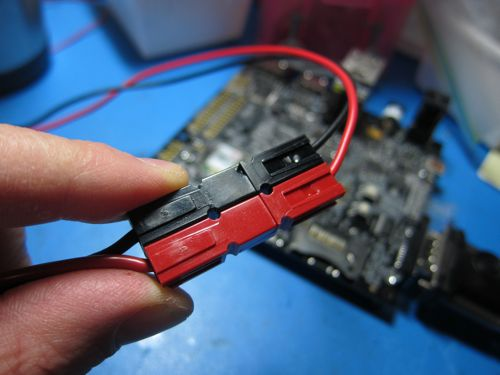 4 Anderson Powerpole plugs